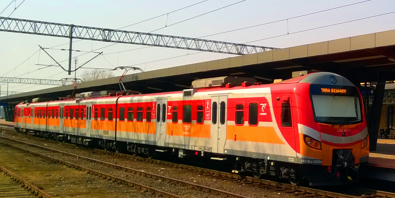 Elektryczny zespół trakcyjny, Toruń Główny